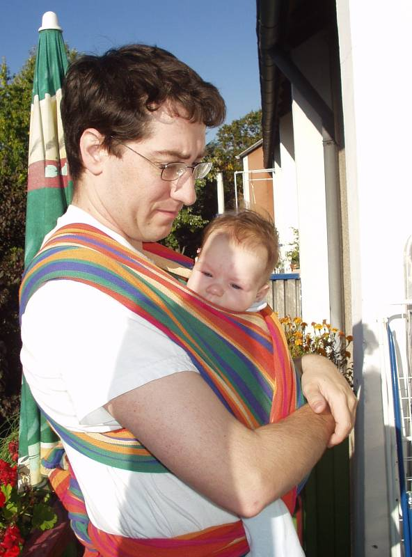 Flups mit Sohn Sebastian im Babytragetuch.